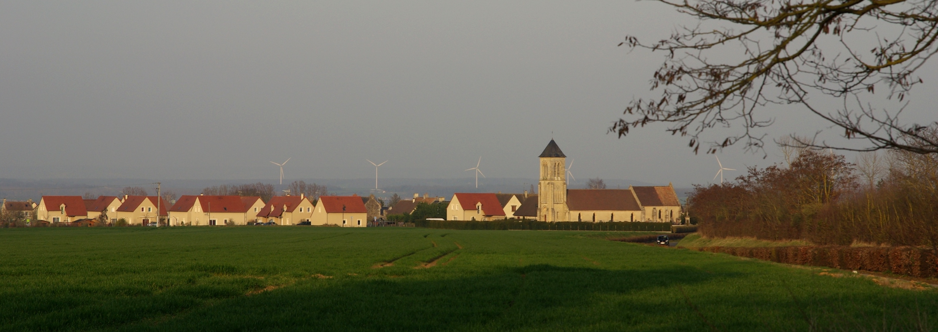 Une vue du village de Cauvicourt, Calvados.